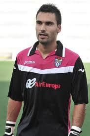 Xavi Ginard - Portero Atletico Baleares